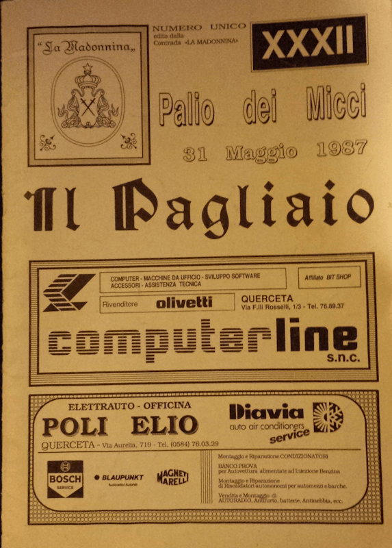 La copertina del primo numero de “Il Pagliaio” uscito il 31 Maggio 1987 in occasione del 32° Palio dei Micci.